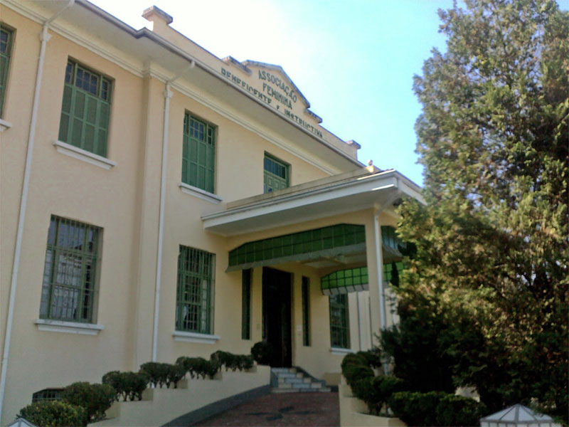 Foto de Instituição beneficente fundada por Anália Franco.